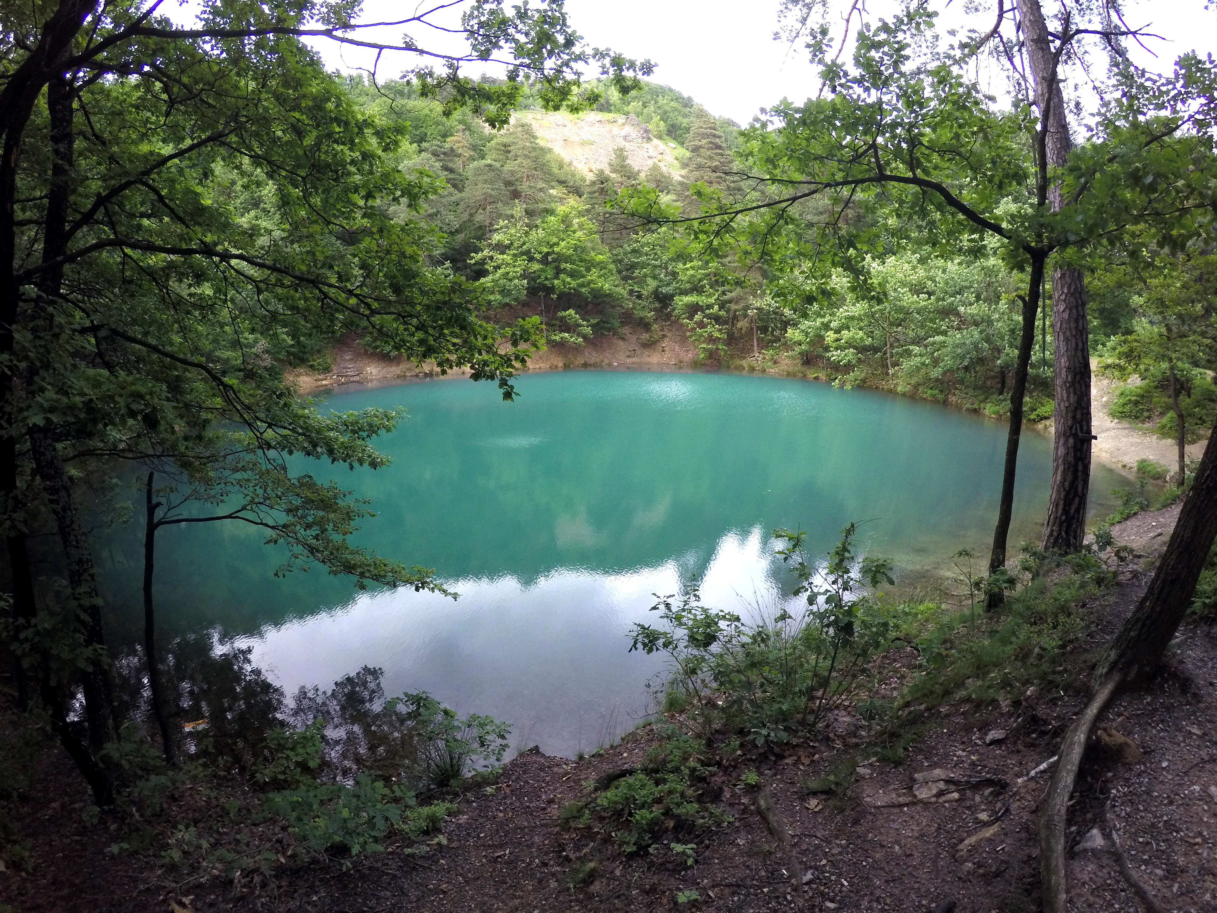 Lacul Albastru, situat în Baia Sprie, județul Maramureș